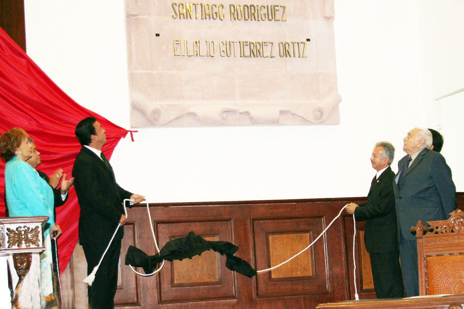 En sesión solemne, llevada a cabo en el Congreso del Estado de Coahuila, el 2 de Mayo de 2006, los Titulares de los Poderes Constitucionales del Estado, encabezados por el Gobernador, Profesor Humberto Moreira Valdés, develaron el nombre de Eulalio Gutiérrez Ortiz, en letras de oro en el Muro de Honor del Recinto Parlamentario. En la fotografía, de izquierda a derecha: Sra. Elosia de Jesús Gutiérrez, Dip. Montoya, Profr. Humberto Moreira Valdés, Dip. Horacio del Bosque, Sr. Luis Gutiérrez Treviño